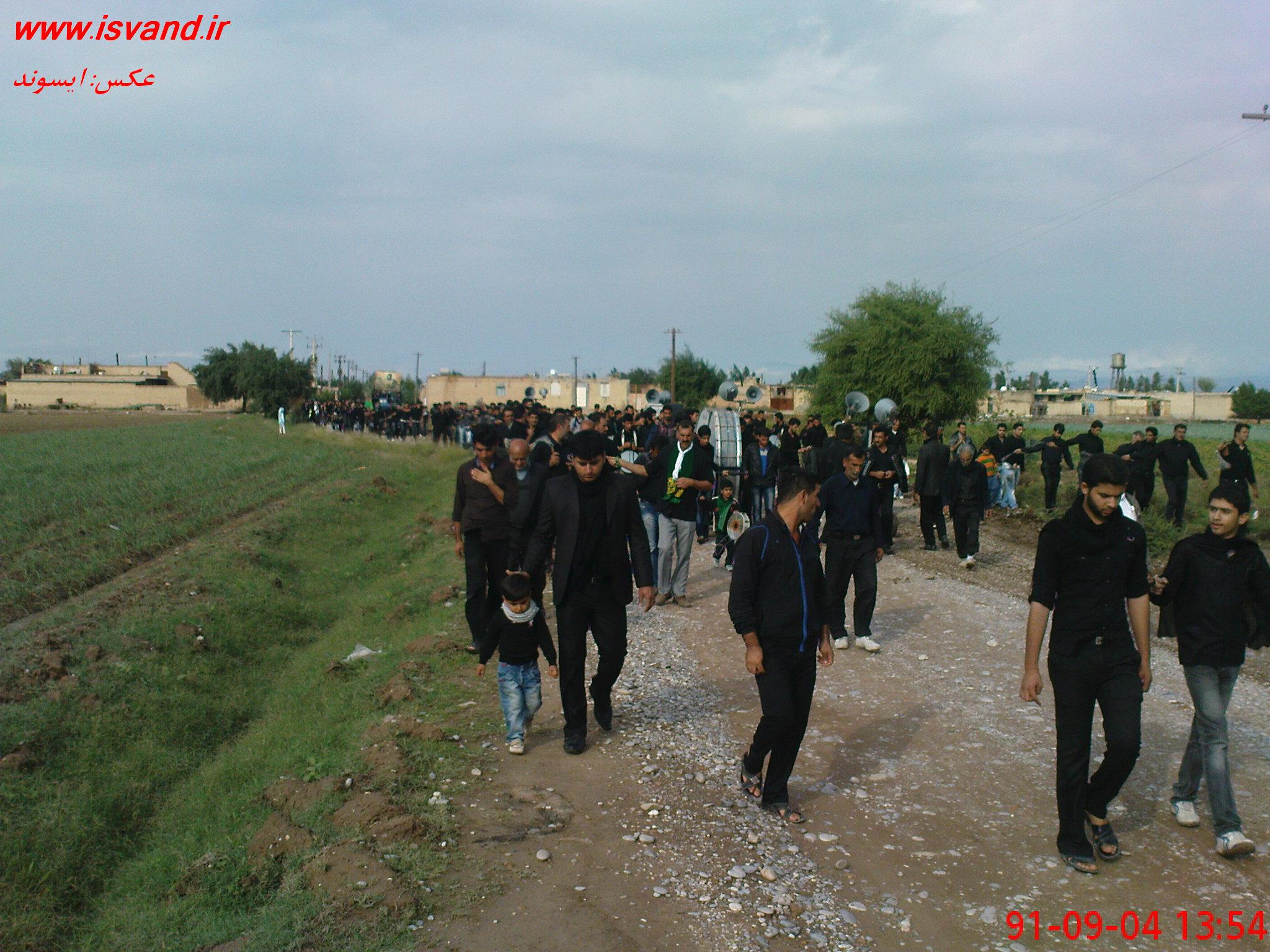 محرم 91 شلگهی